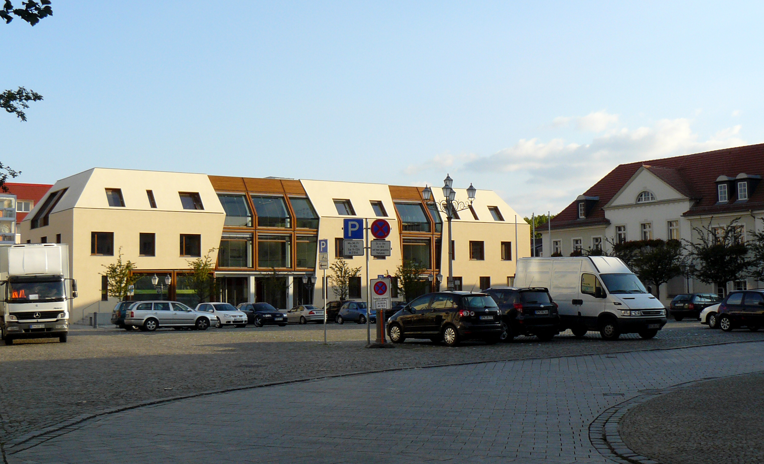 Bürgerhaus Spremberg. Entstanden aus dem Umbau eines Plattenbau an gleicher Stelle.